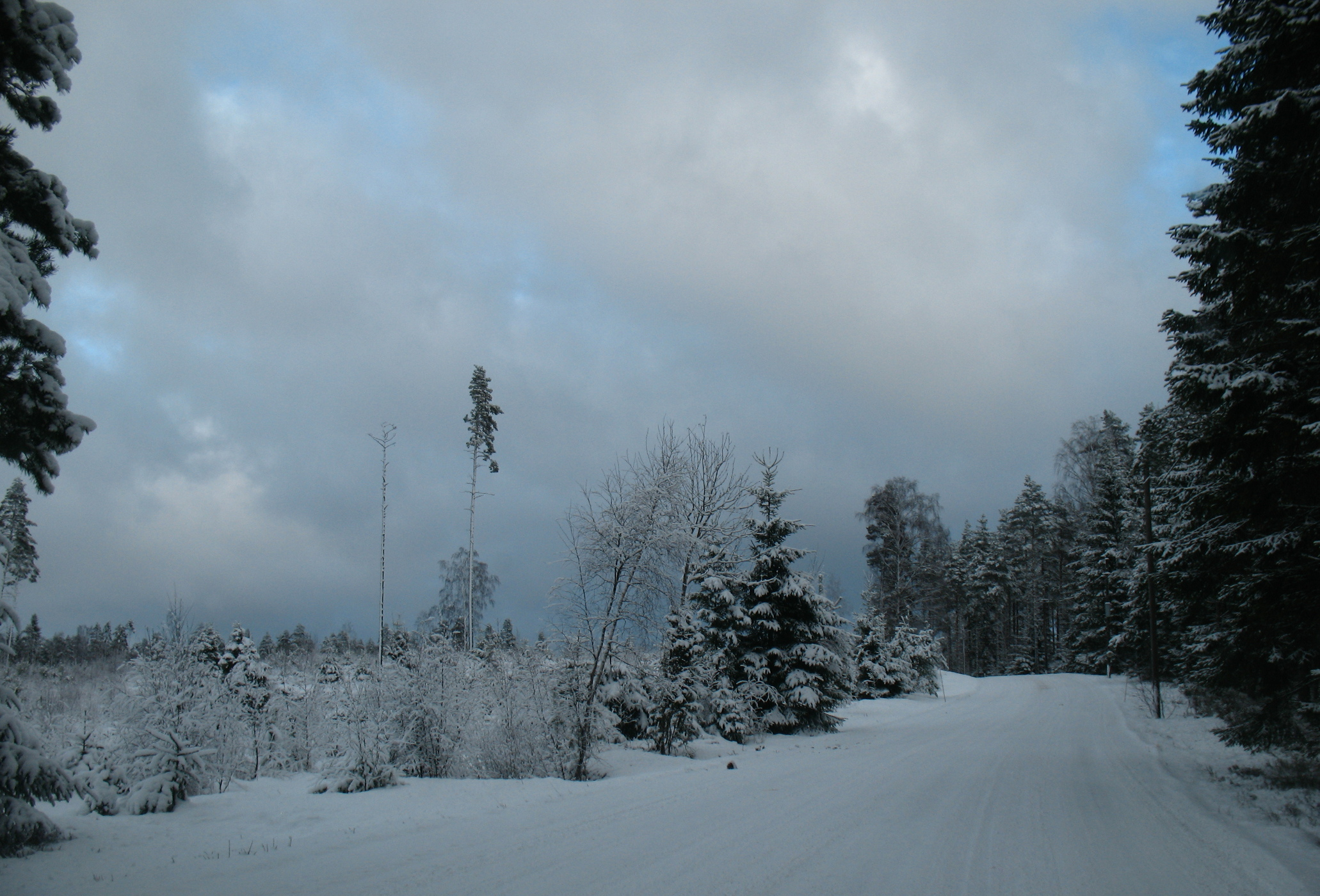 Fylkesvei 922 i Østfold går mellom Kjølen og Holen i Halden. Veiens lengde er 5,9 km. Bildet er tatt nær Kjølødegården.